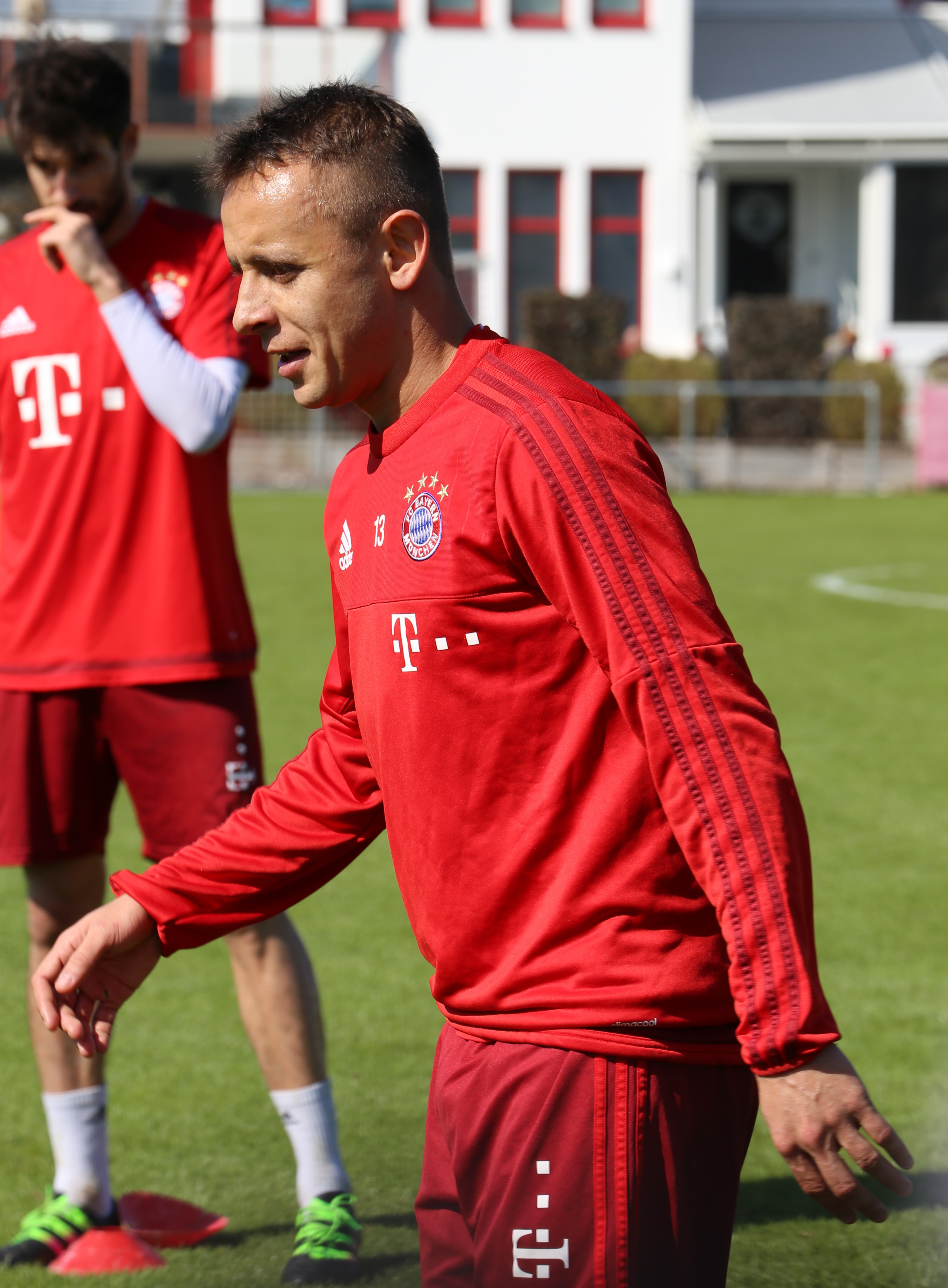 Rafinha beim Training auf dem Gelände des FC Bayern München